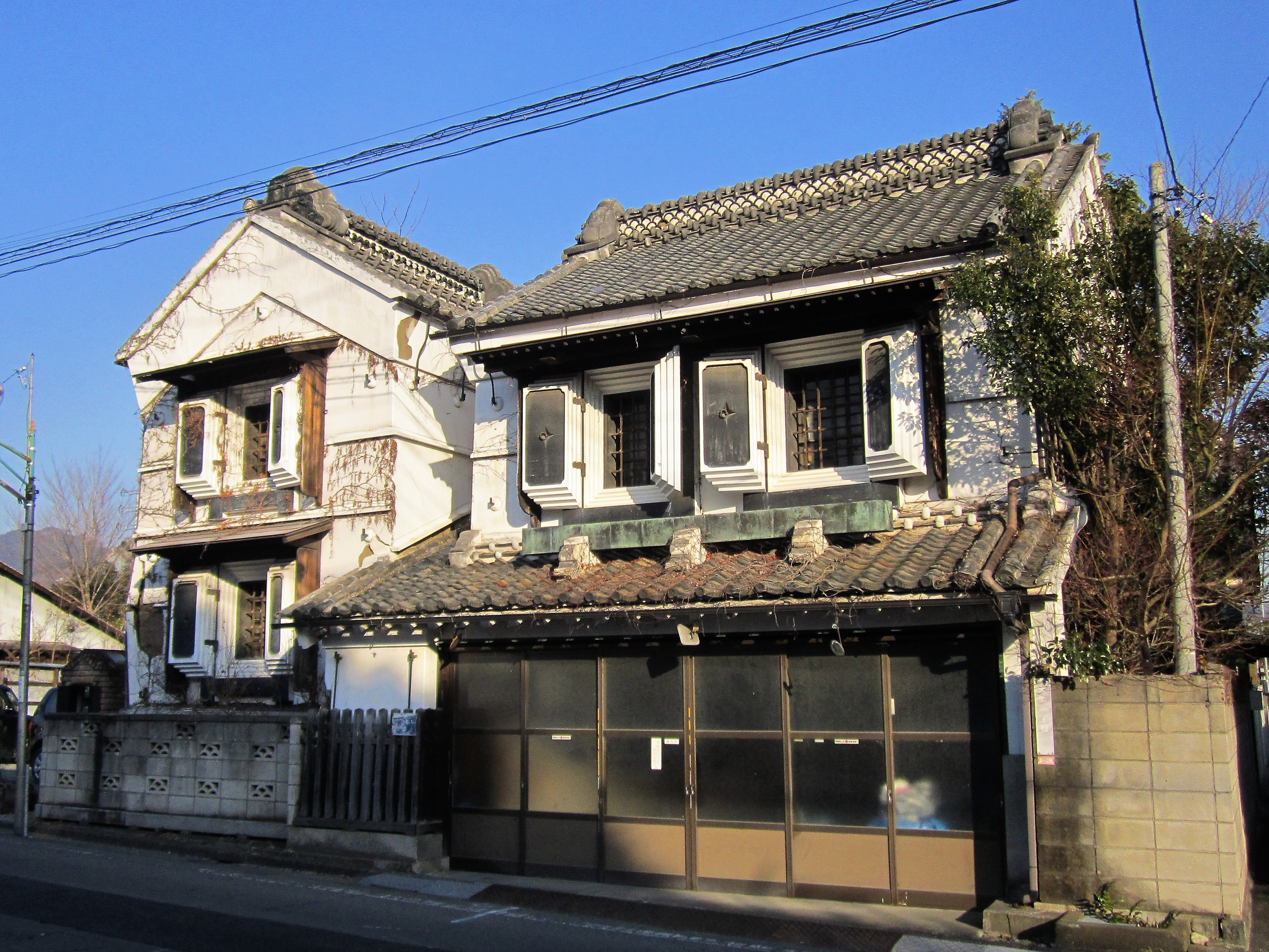 平田家住宅旧店舗（右）・平田家住宅旧店蔵（左）（桐生新町 重要伝統的建造物群保存地区） Canon PowerShot A2200